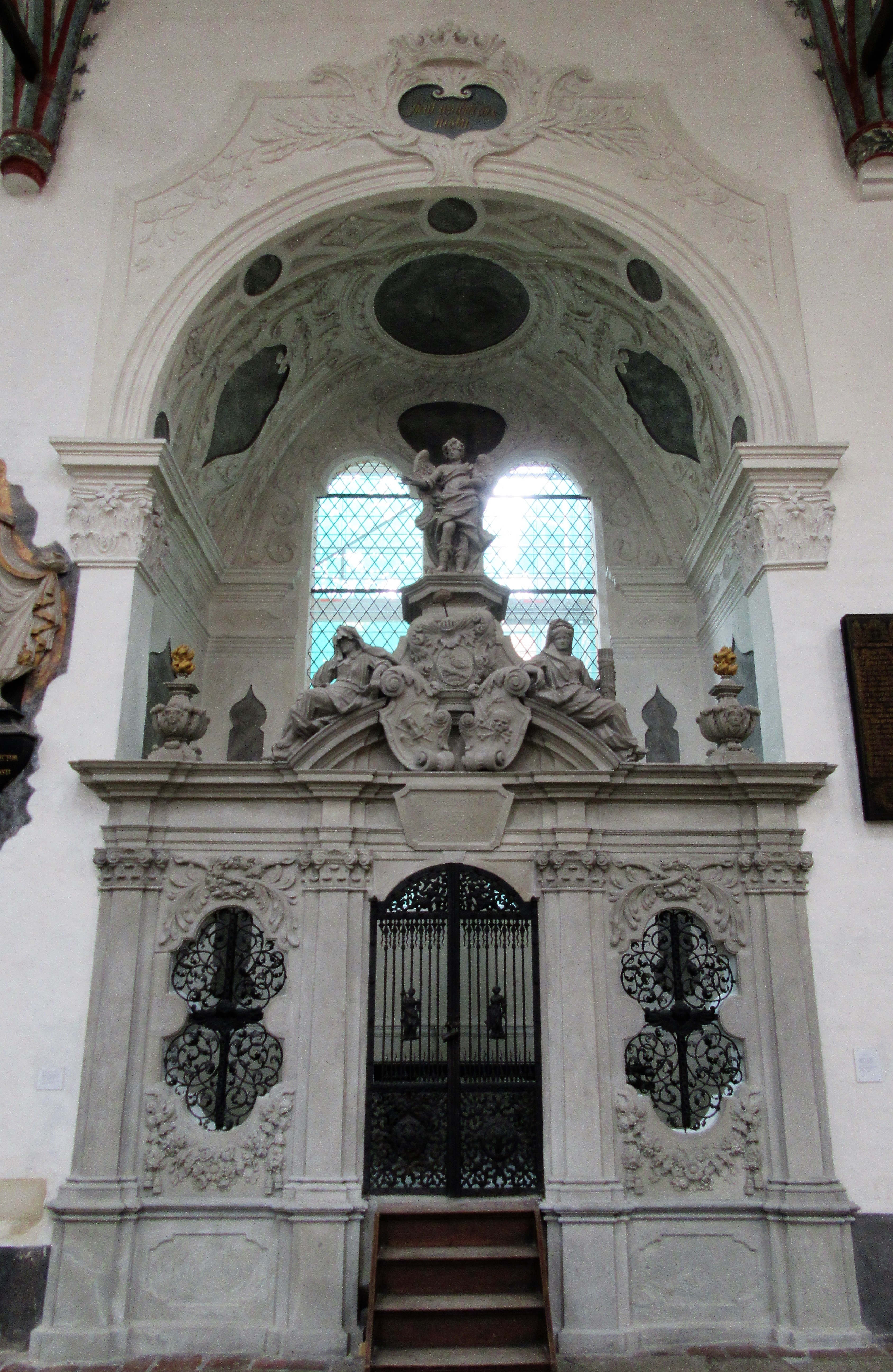 Grabkapelle der Familie Green in St. Katharinen, Lübeck